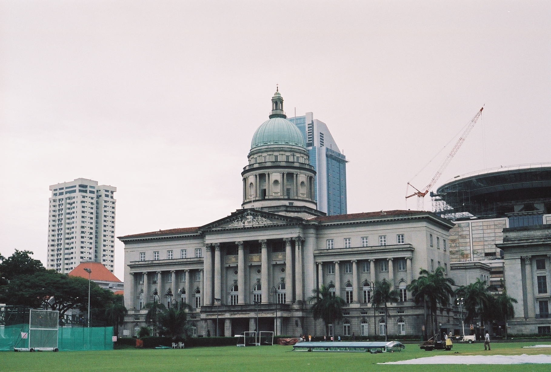 Auteur : FC Georgio (2005) Date : avril 2005 Lieu : Singapour